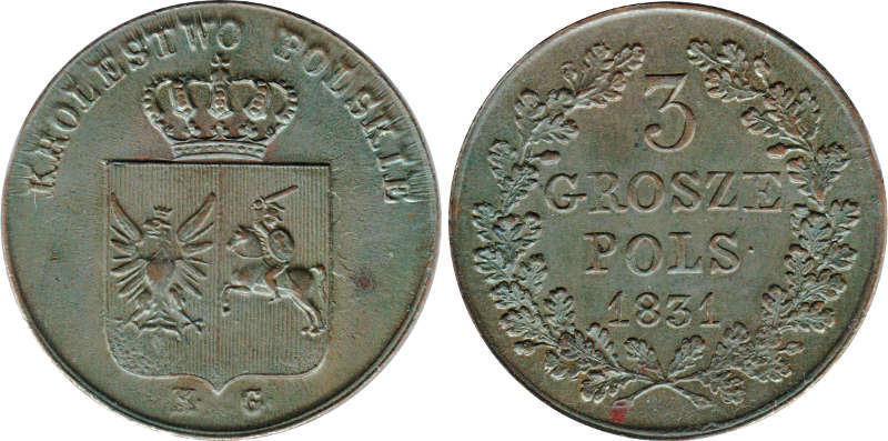 3 grosze polskie 1831 lapy orla proste